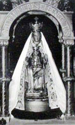 Das Gnadenbild im Prachtgewand um 1929/30